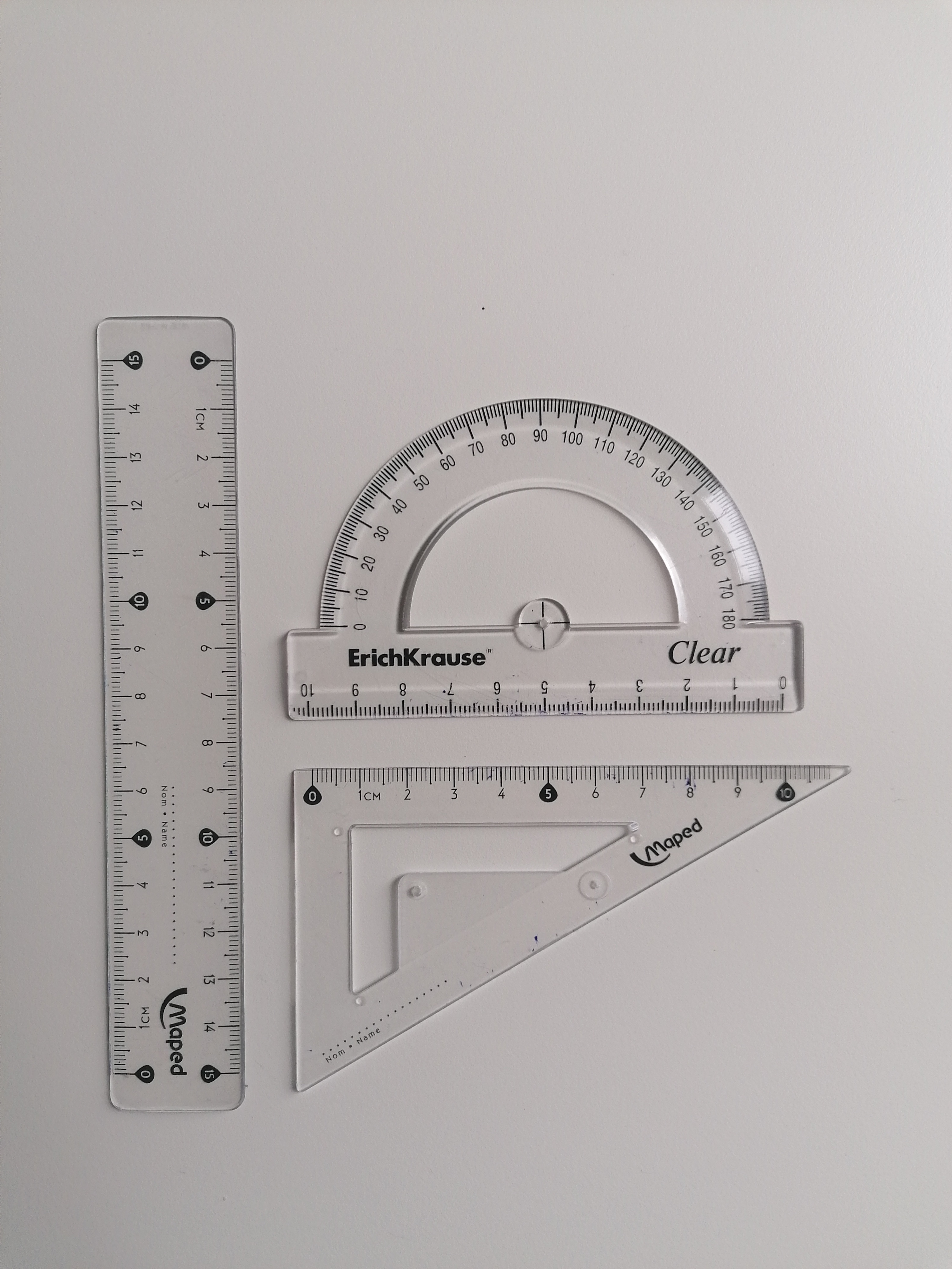 Erinevat tüüpi joonlauad